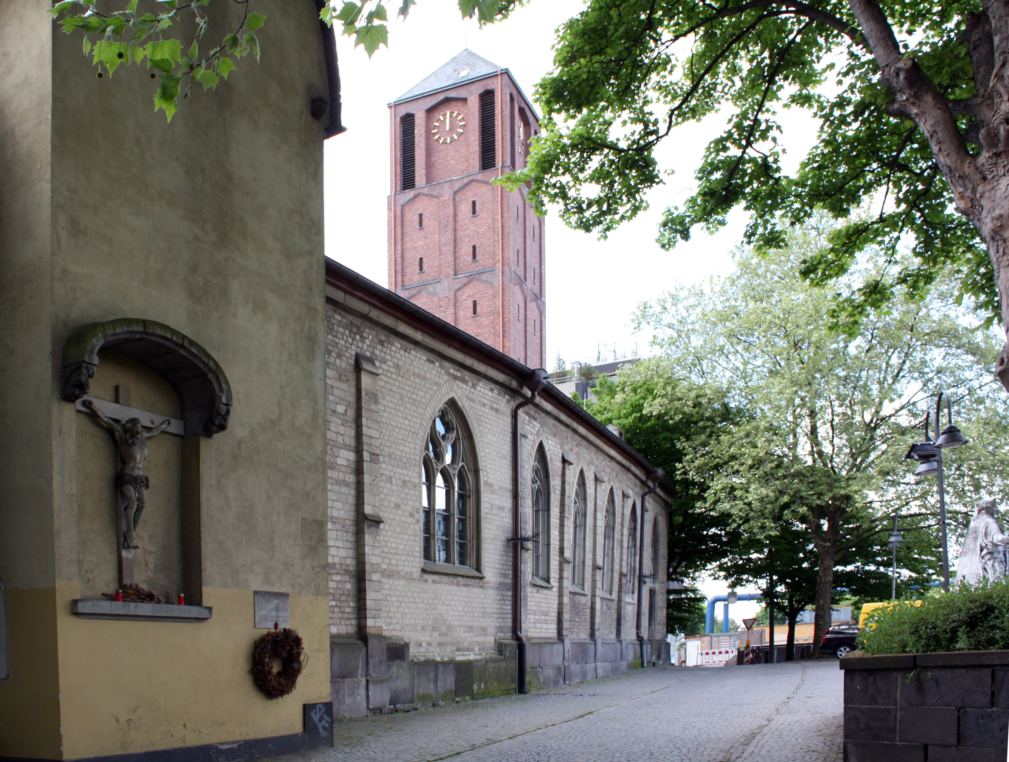 St. Johann Baptist Köln, Reste des alten Kirchenbauwerks